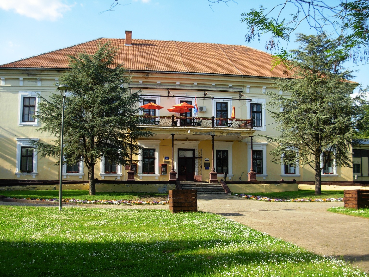 Prednja strana srednje poljoprivredne škole u Futogu.